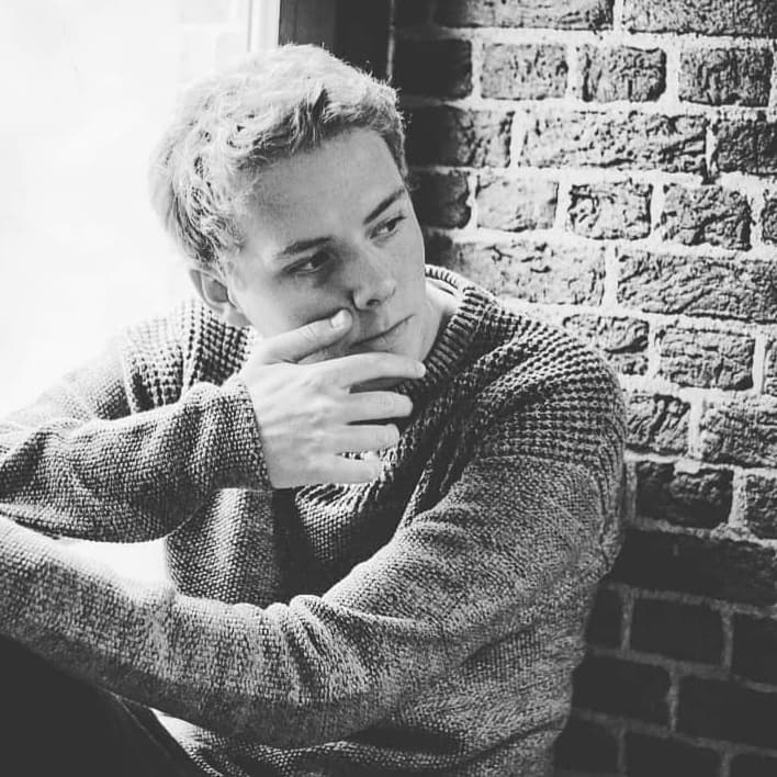 Tim Tielemans (Loezers)